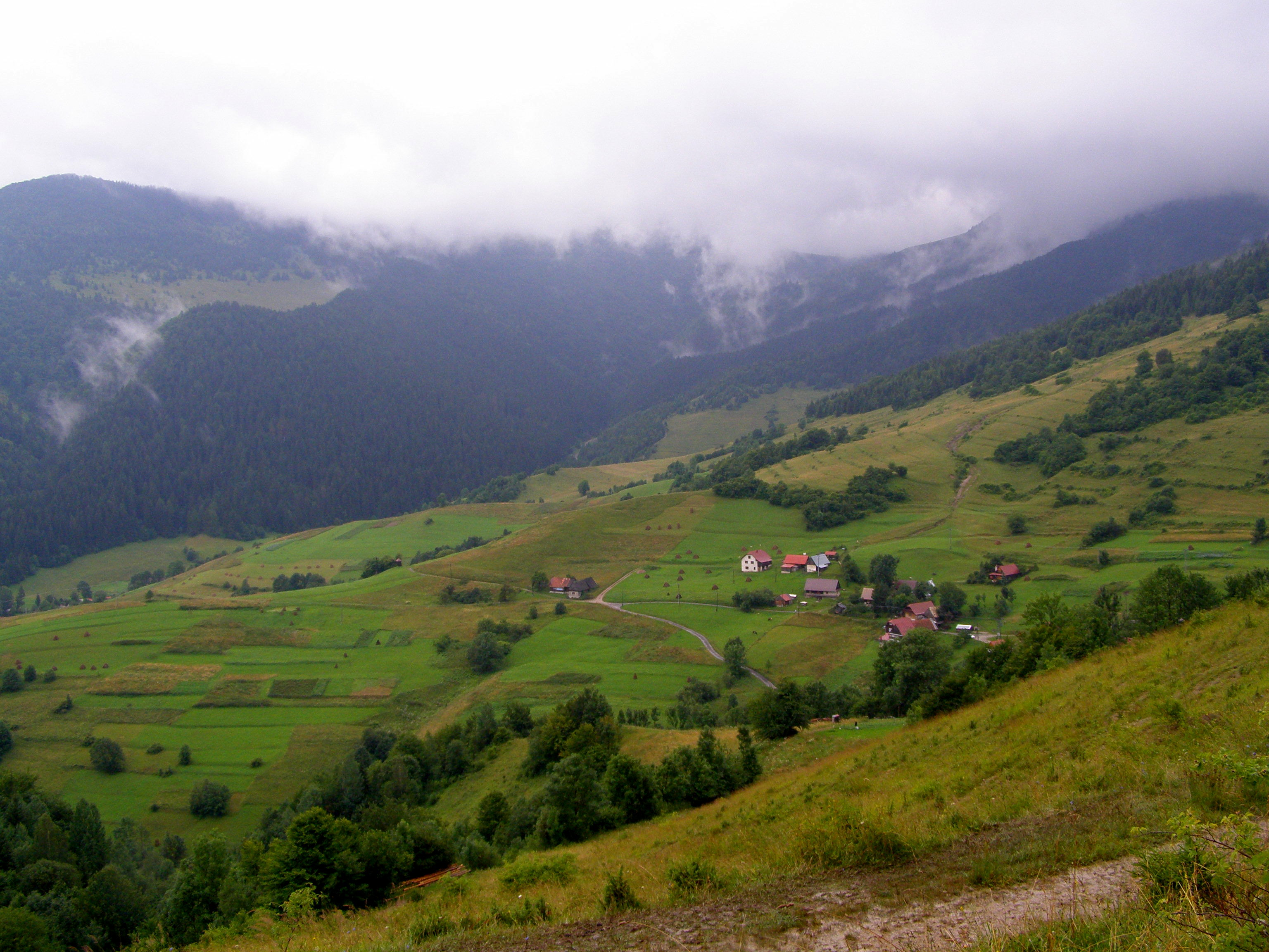 Krivánská Malá Fatra, sedlo Príslop nad Bielou (obec Zázrivá, část Biela)